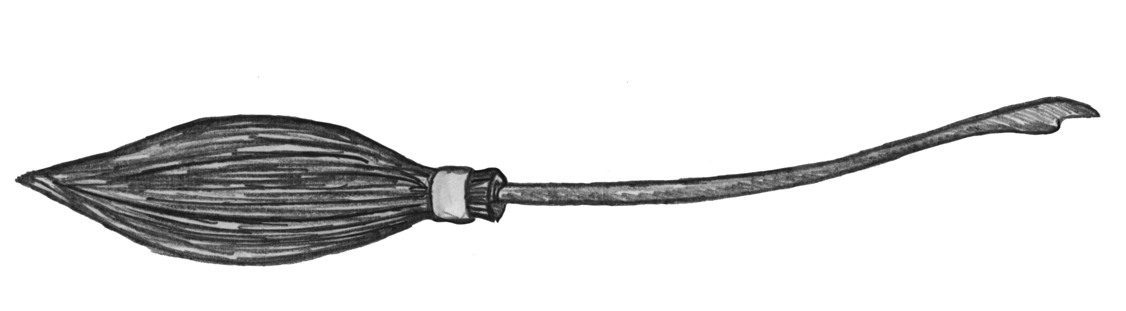 balai volant de la saga Harry Pooter Nimbus 2001